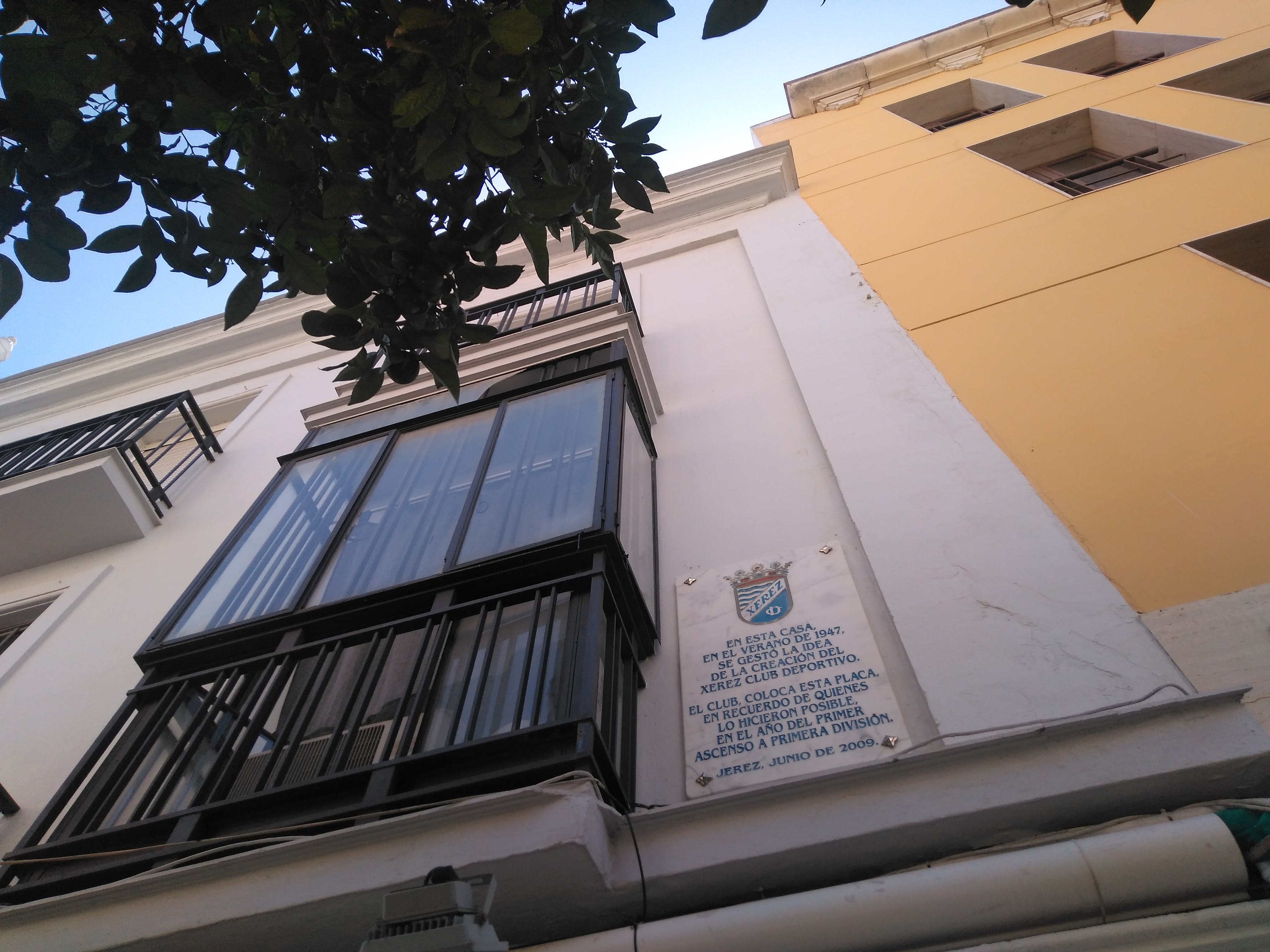 Placa en la sede de la Fundación del Xerez CD (Jerez de la Frontera, España)